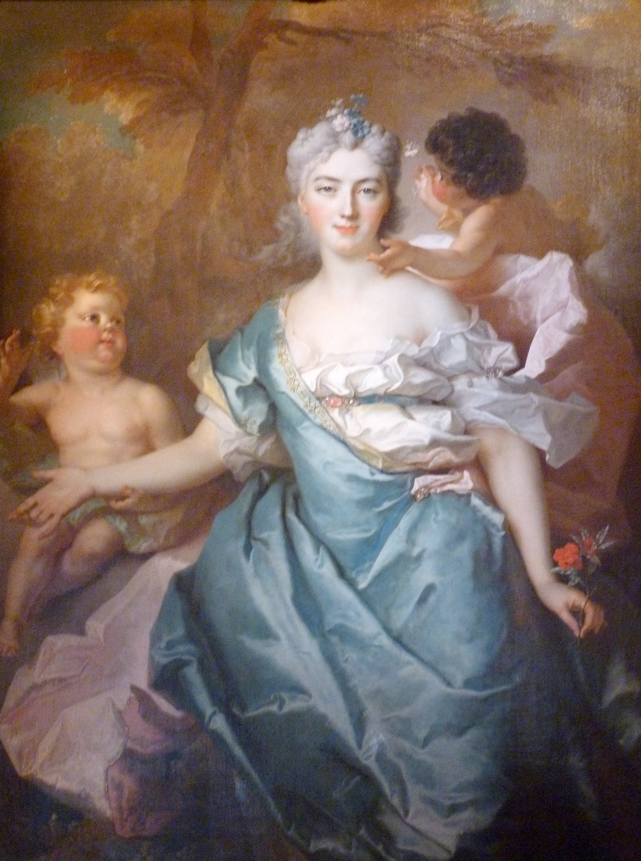 Collection particulière de Georges de Lastic (1927-1988) lors de l'exposition Le cabinet d'un amateur, n°22, au musée de la chasse et de la nature, Paris (décembre 2009-mars 2010).